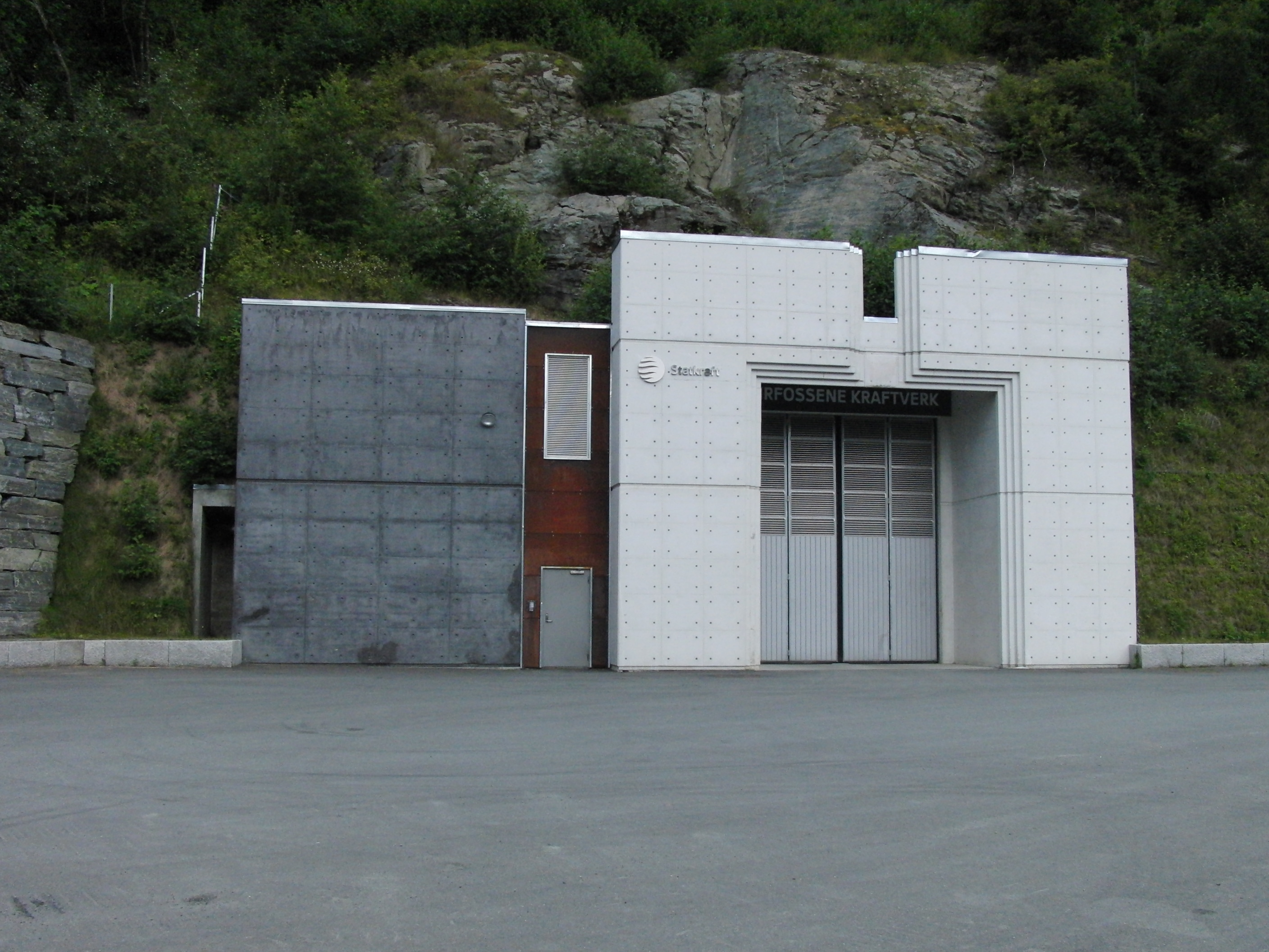 Leirfossene kraftverk